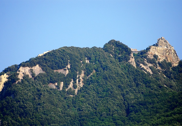 Vrcholek hory Monte Epomeo